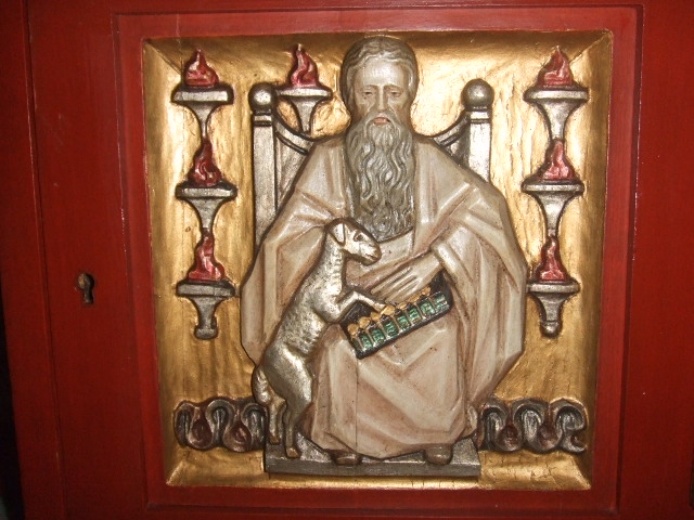 Pfarrkirche St. Peter und Paul (Neufra an der Donau, Stadt Riedlingen) Jugendstilalatar in der Krypta, gefertigt nach Entwürfen von Prof. Karl Rieber durch Bildhauer Gabriel Lämmle; Detail der Predella